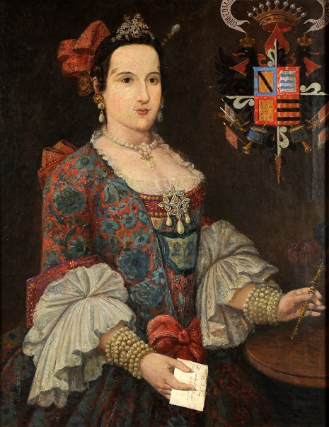 Retrato de Doña Joaquina María Magdalena Brun y Carvajal Primera Duquesa de San Carlos con rango de Grandeza de España por merced del Rey Don Carlos III de Borbón